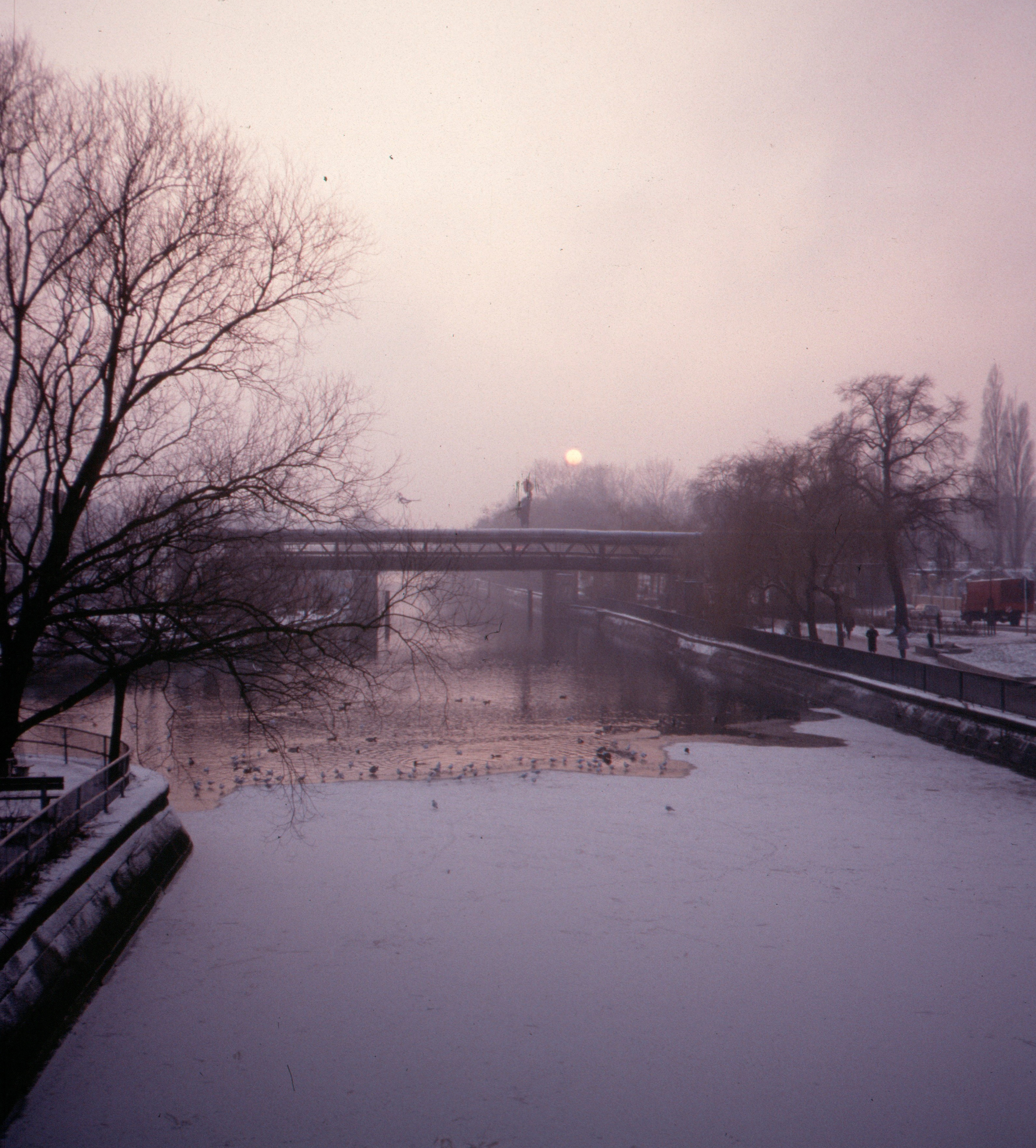 Landwehrkanal Kreuzberg SO 36 6.1.90